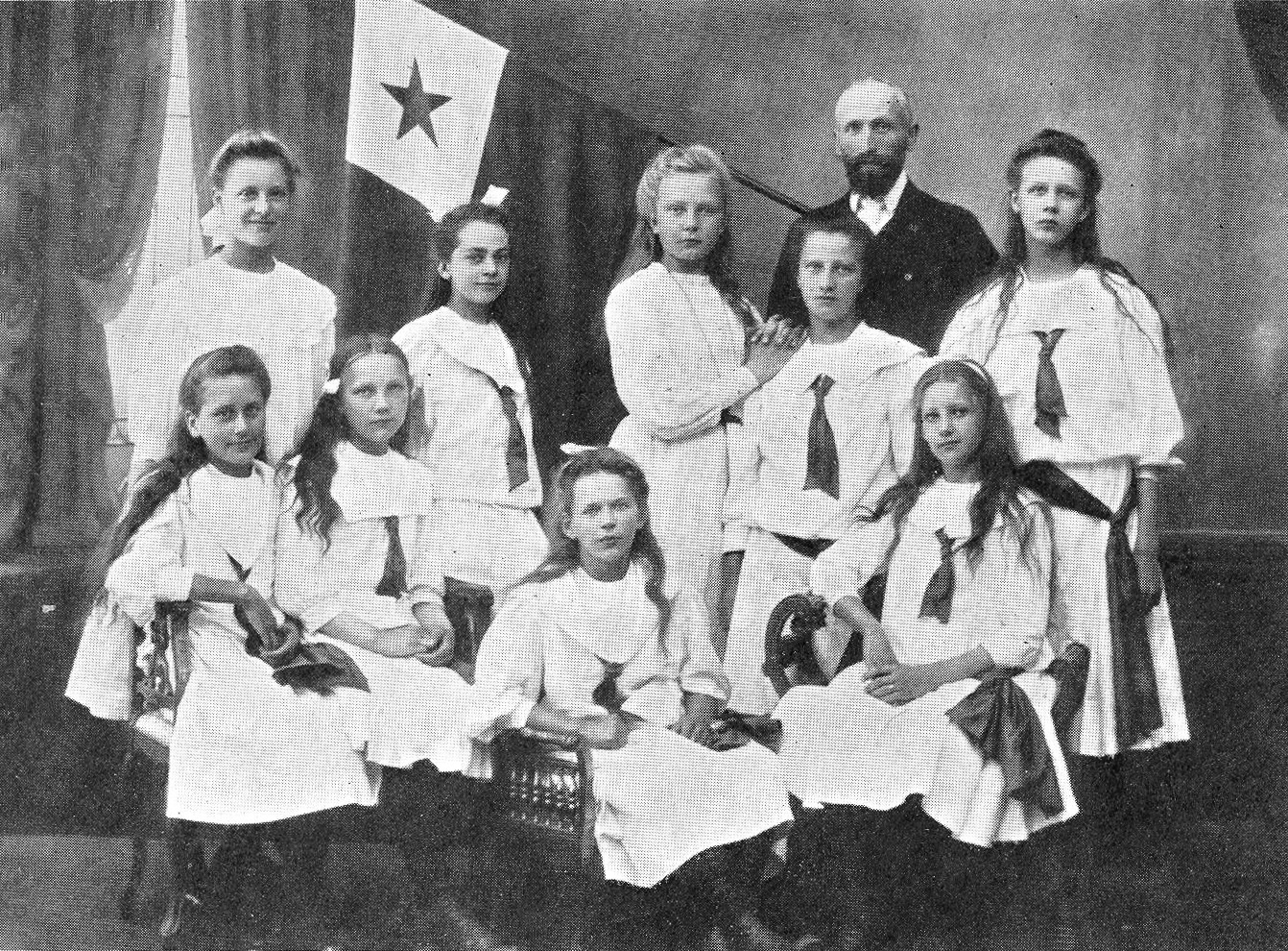 Subskribo de la poŝtkarto: Vivu Esperanto kaj U.E.A.! Helsingborg en aŭgusto 1909. Esperantistaj lernantinoj.